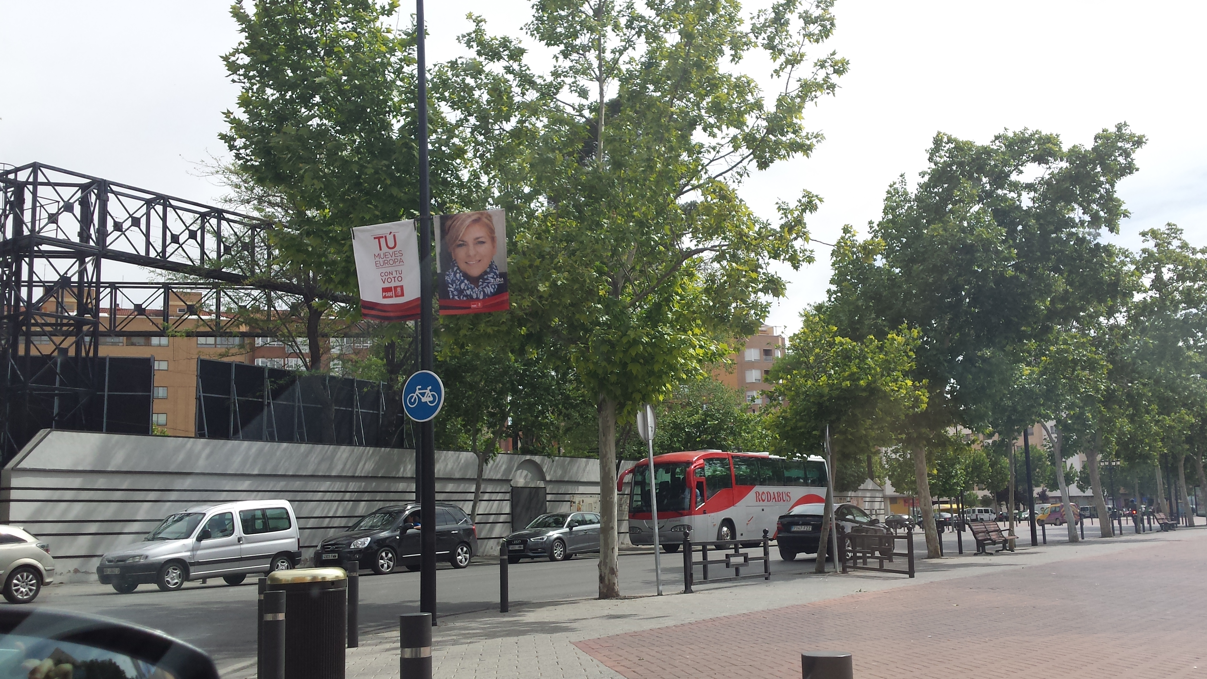 Caseta de los Jardinillos. Albacete